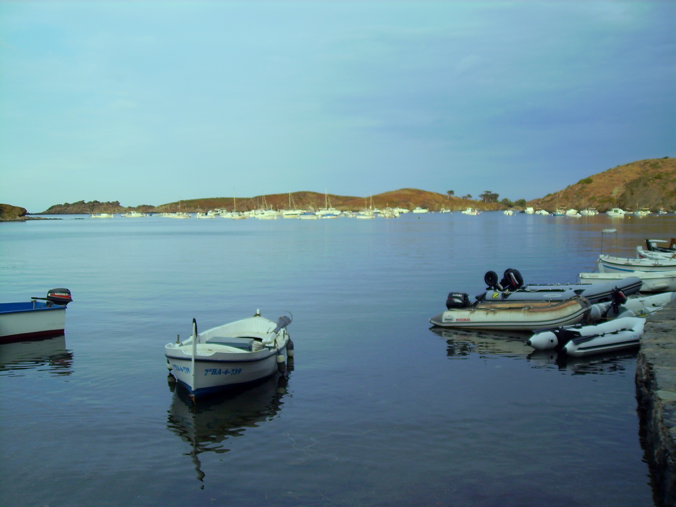 Salvador Dalì'house view in Portlligat, Cadaqués, Catalunya, Spain